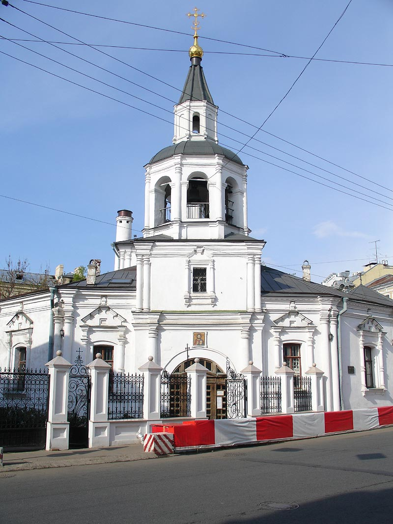 Dormition Church in Pechatniki, Sretenka Gates Square, Moscow, built in 1695